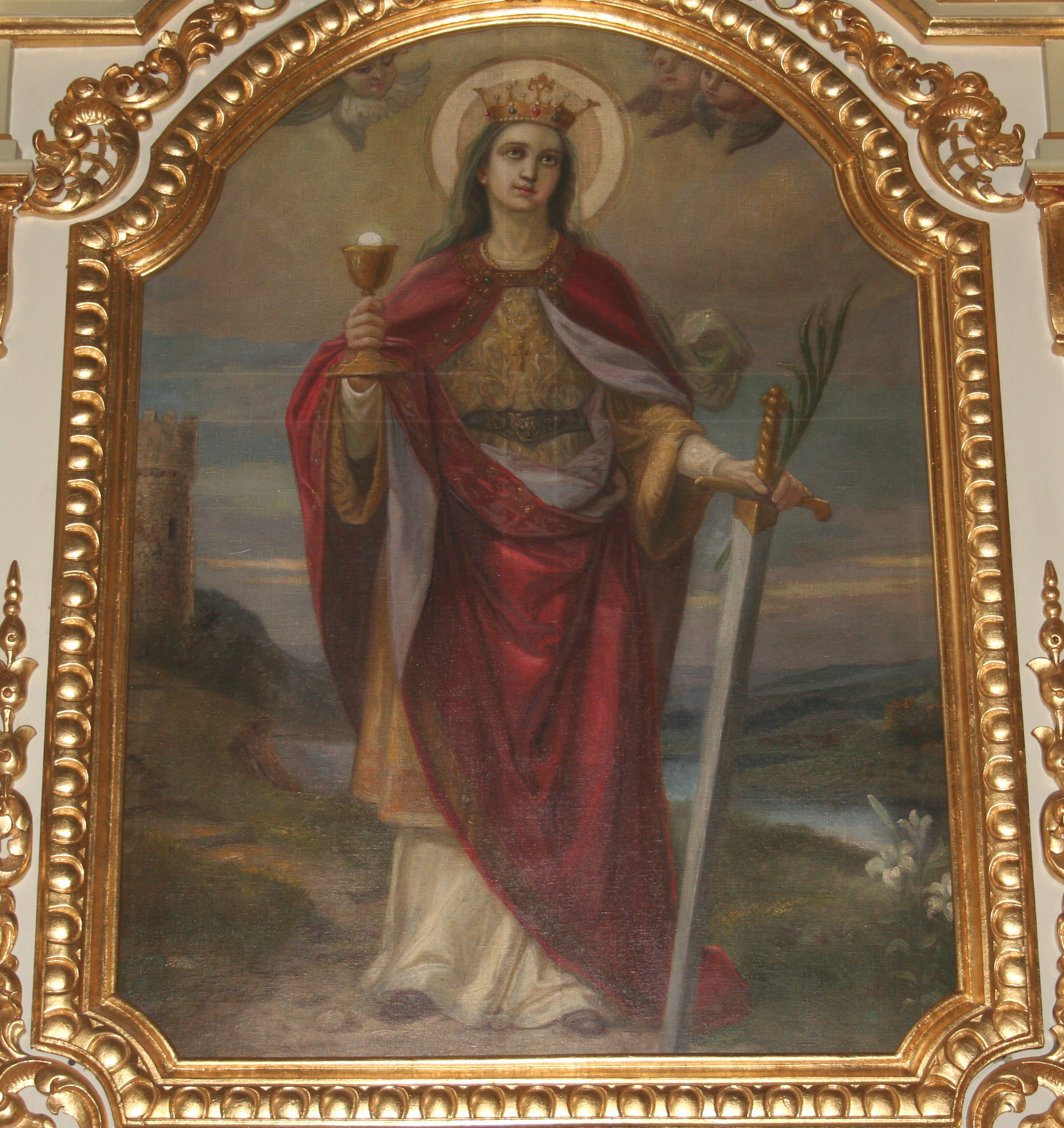 obraz_świętej_Barbary_w kościele w Niedobczycach